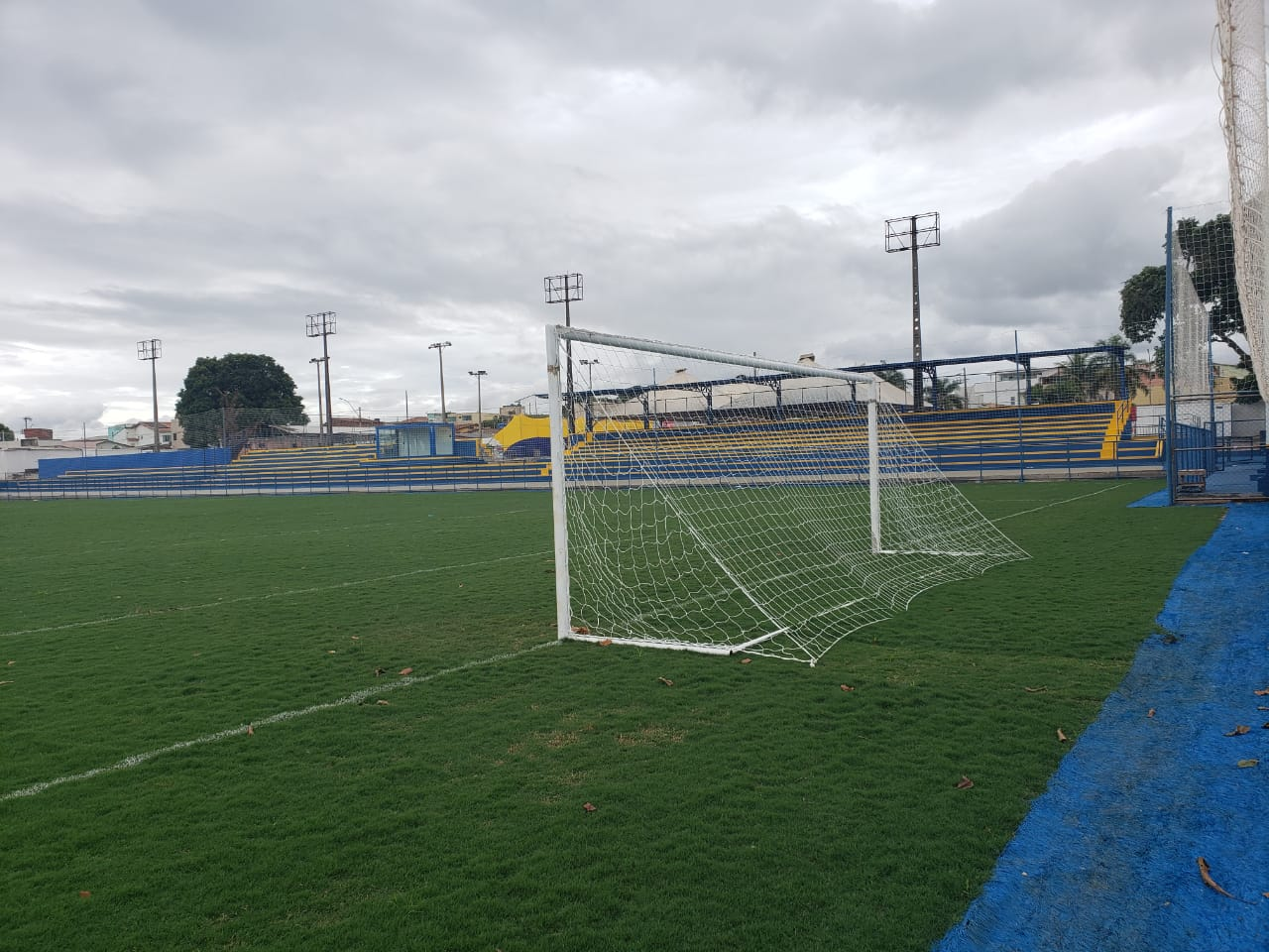 Foto da única arquibancada do Estádio Defelê, ângulo da foto foi de trás do gol próximo aos vestiários.